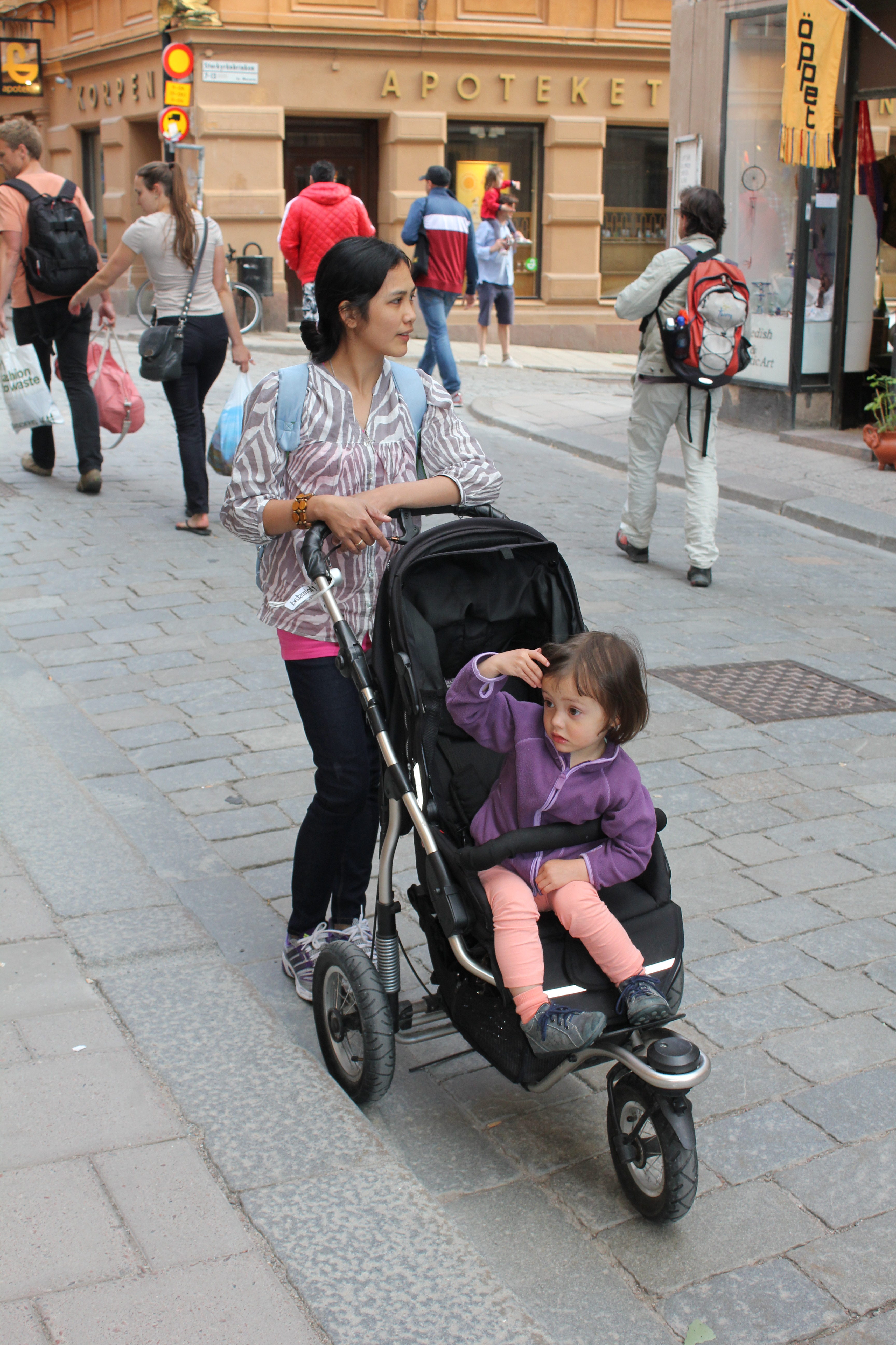 Mor og datter i Gamla Stan i Stockholm.